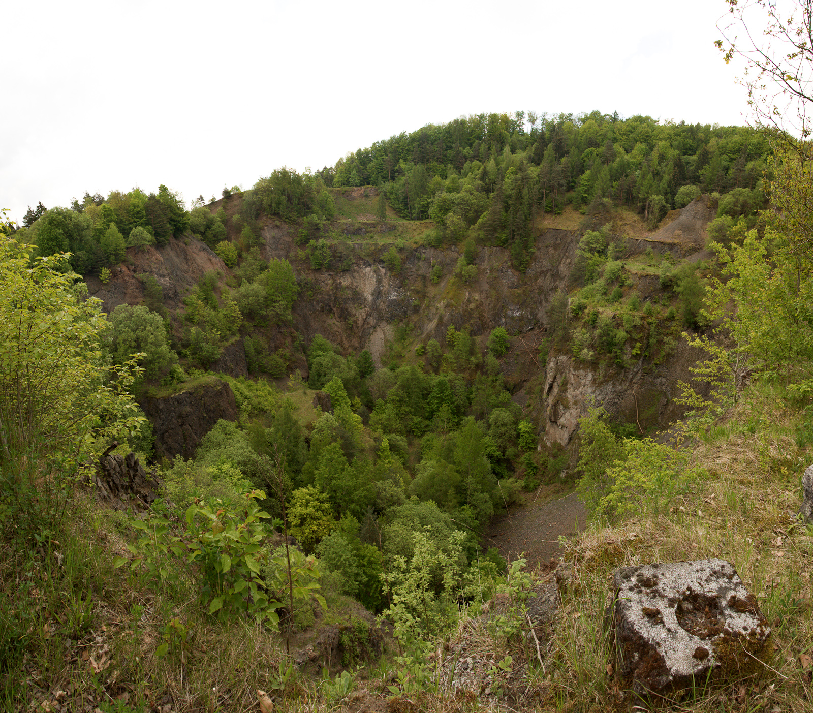 Blick in die Abbaugrube des ehemaligen Basaltsteinbruchs am Sodenberg